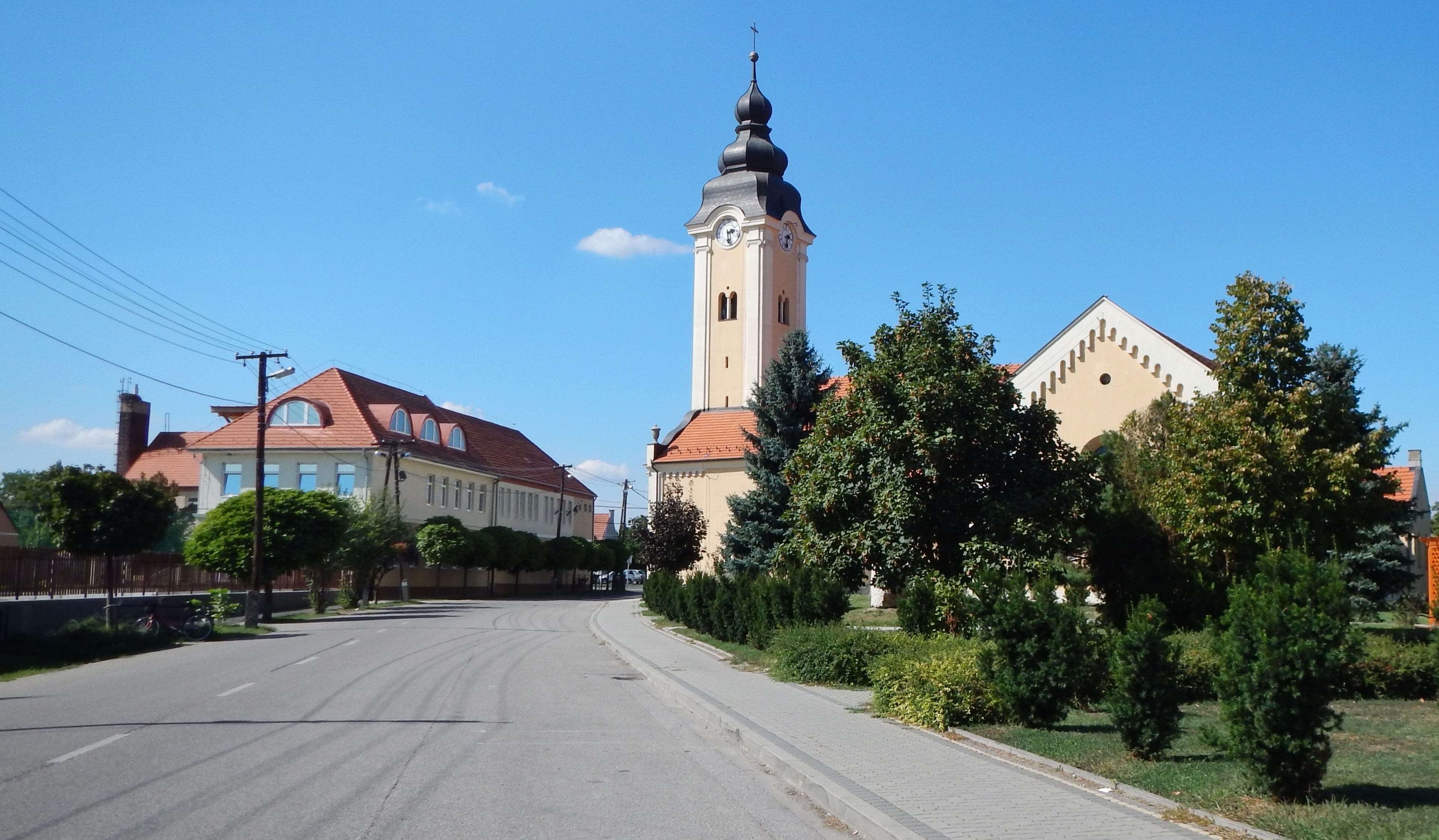 Mosonszolnok